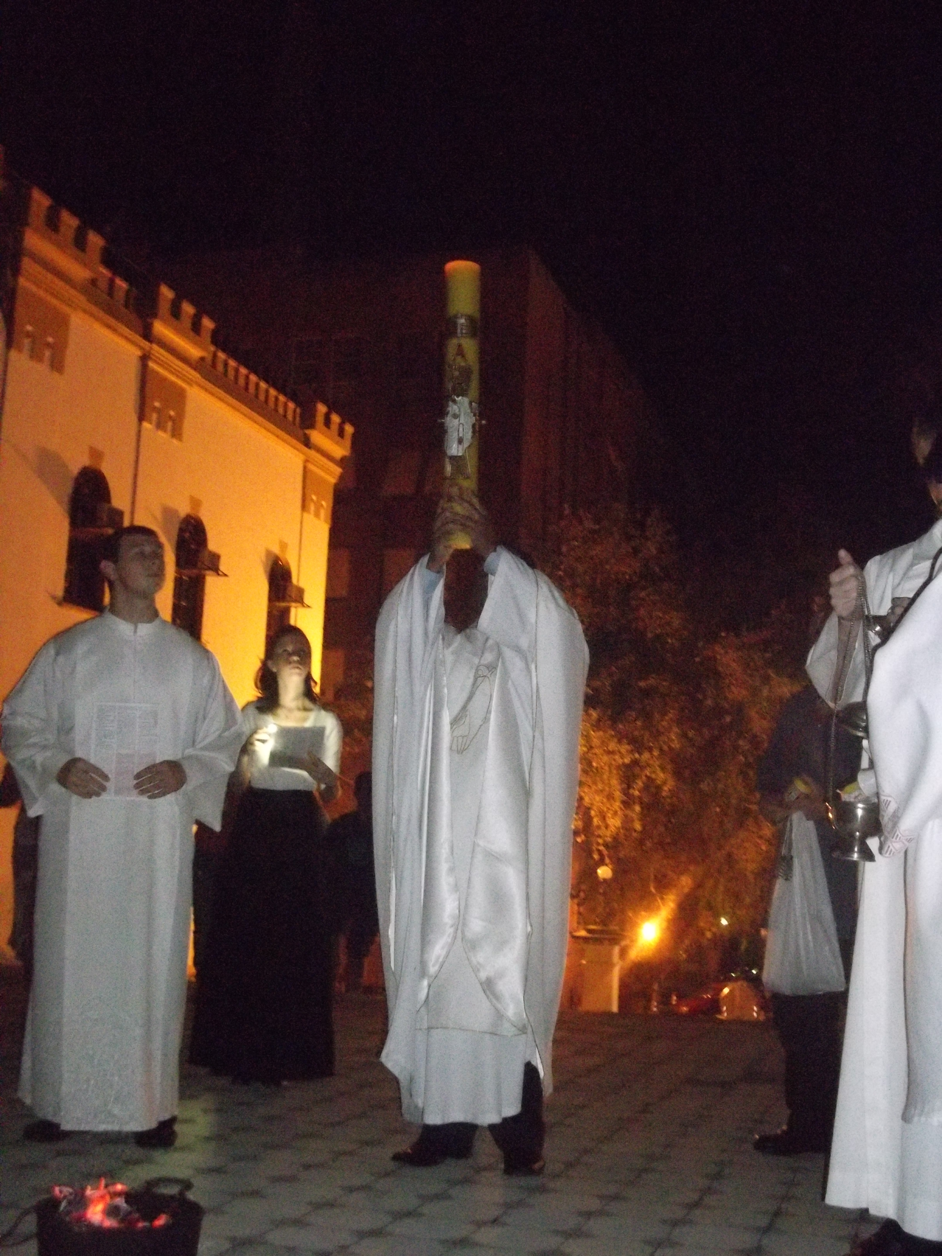 Igreja Nossa Senhora das Dores em Porto Alegre - Vigília Pascal 2013